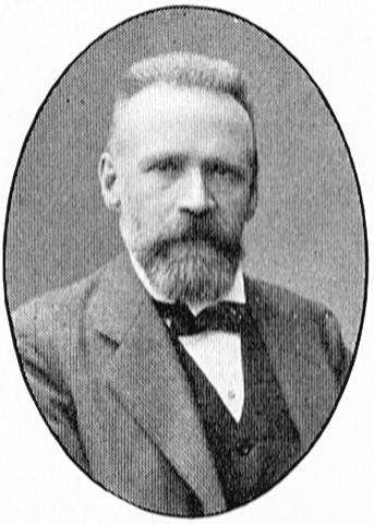 Arkitekten Johan Arvid Vallin